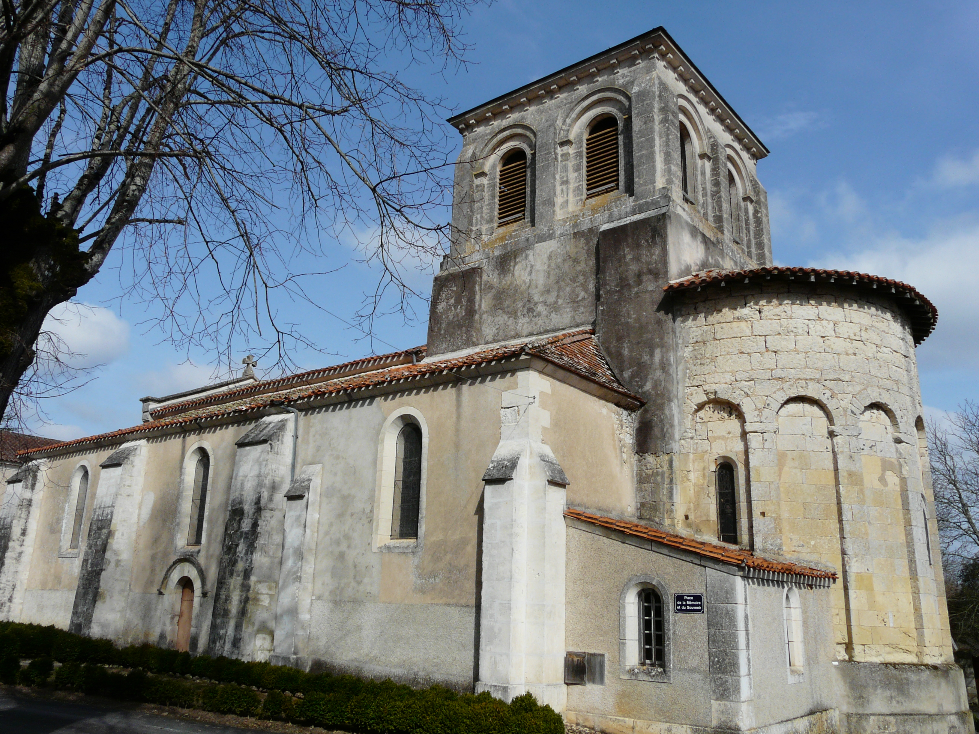 L'église Saint-Pierre-ès-Liens de Montrem, Dordogne, France.